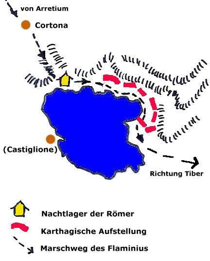 Schlachtortnung bei der "Schlacht am Trasimenischen See", 217 v.Chr. Diese Skizze kann wirklich gerne überarbeitet werden; sobald Grafik auf meine Handzeichnungen zurückgreifen muss wird's unprofessionell...